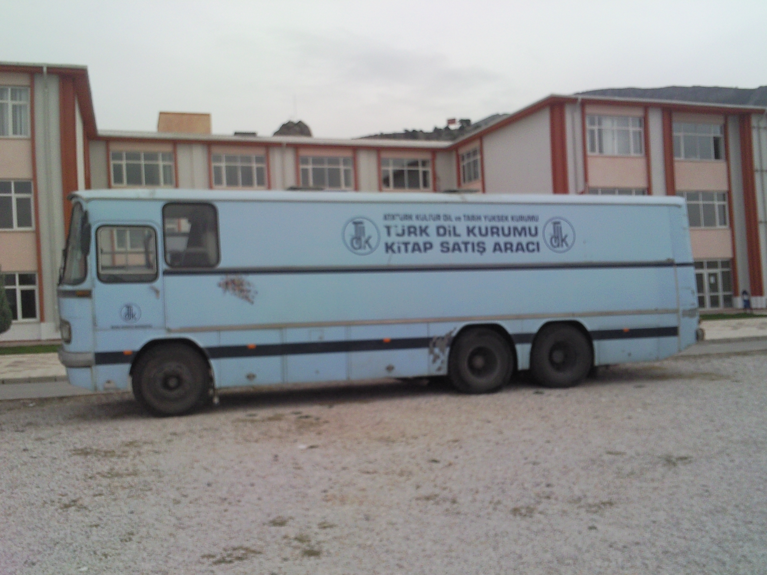 Türk Dil Kurumu'na ait bir kitap satış otobüsü, GOÜ.